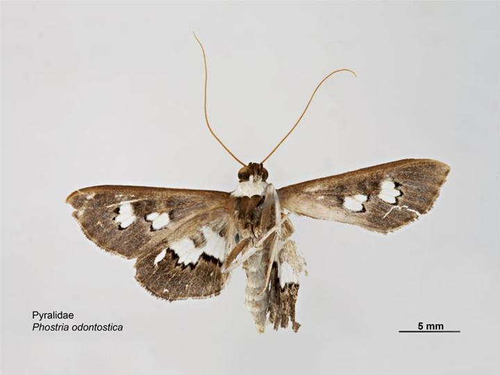 Phostria odontostica, ventral view.